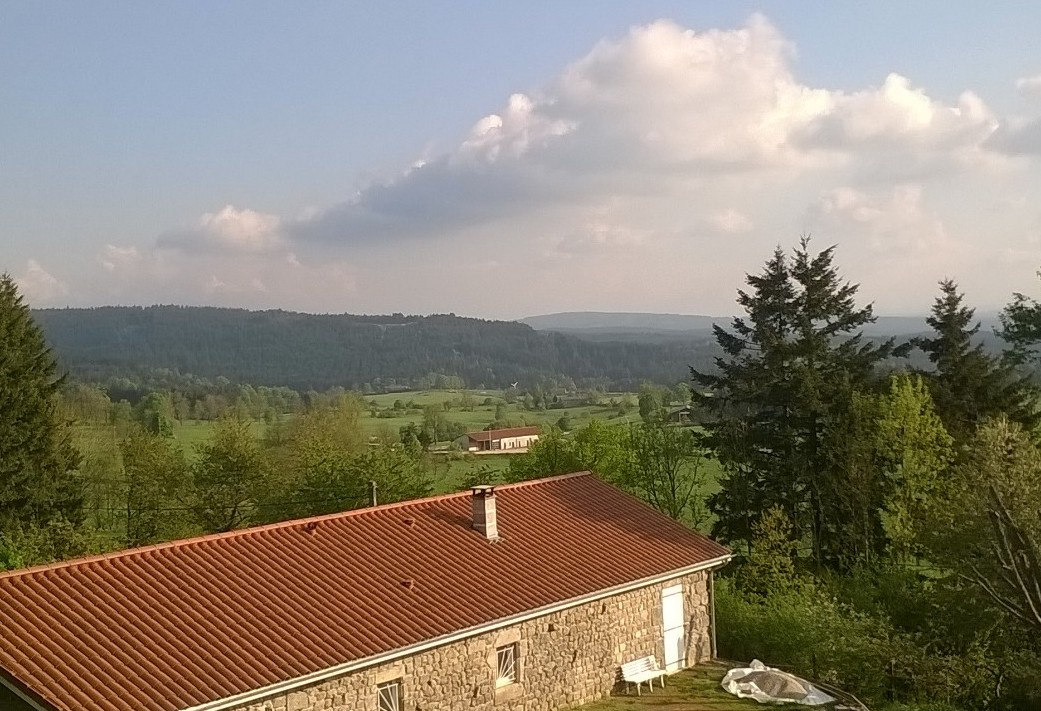 montregard12